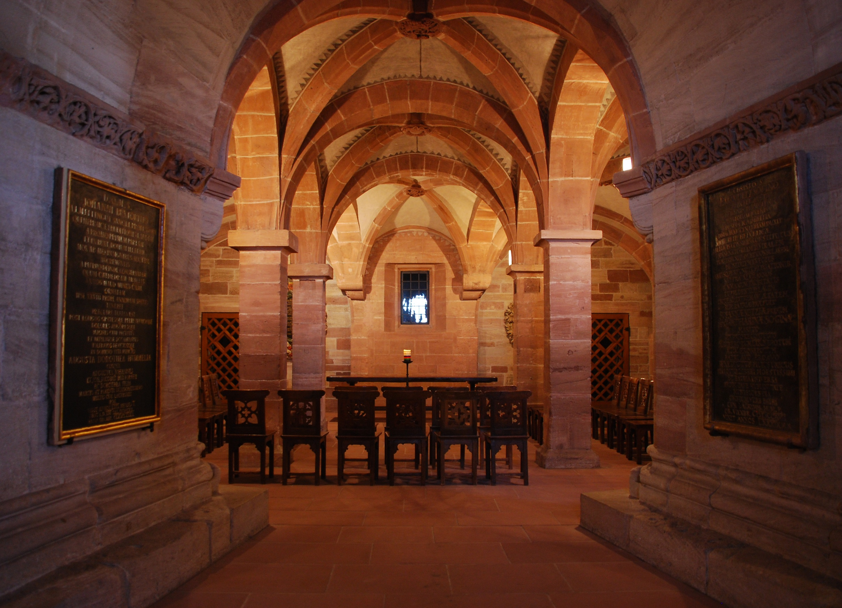 Crypt in the Cathedral of Basle Beschreibung: Krypta im Basler Münster Quelle: 27.02.2005, selbst fotografiert Fotograf / Zeichner: Wladyslaw Sojka Andere Versionen: (für die GNU FDL) 22:17, 27. Feb 2005 Wladyslaw Sojka 2.880 × 2.081 (1.02 MB)